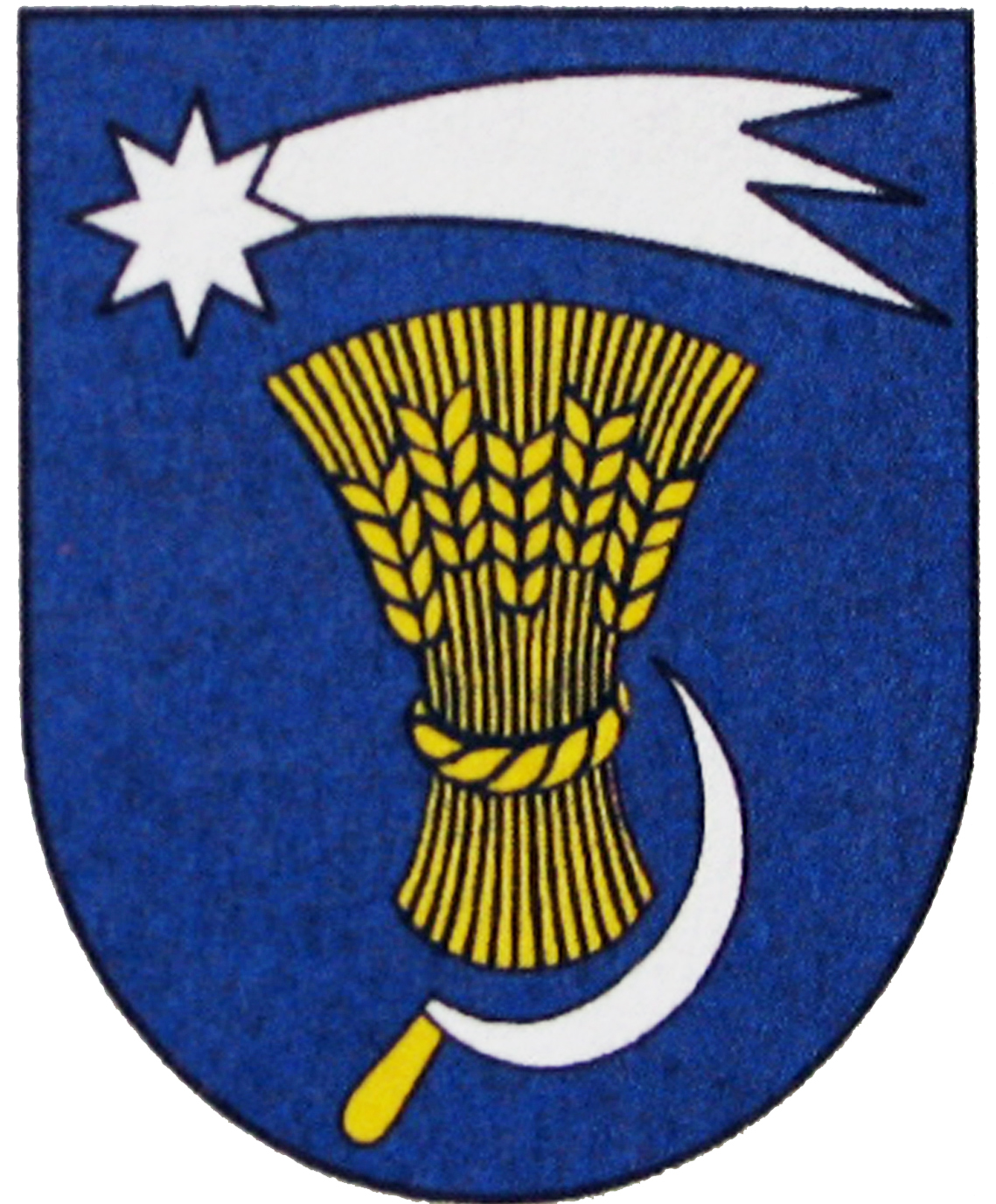 Erb obce Kračúnovce (HR: K-58/1995): V modrom štíte pod striebornou osemhrotou položenou kométou je zlatý snom. Pod snopom je strieborný ľavošikmý kosák so zlatou rukoväťou. Autormi erbu Sergej Pančák a Peter Kónya.